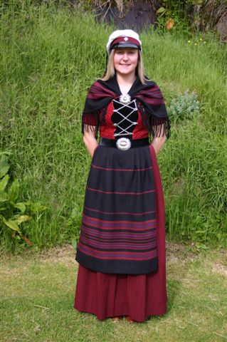 Student, Faroe Islands